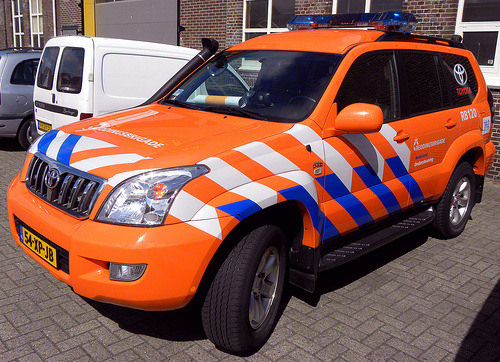 Zie naam